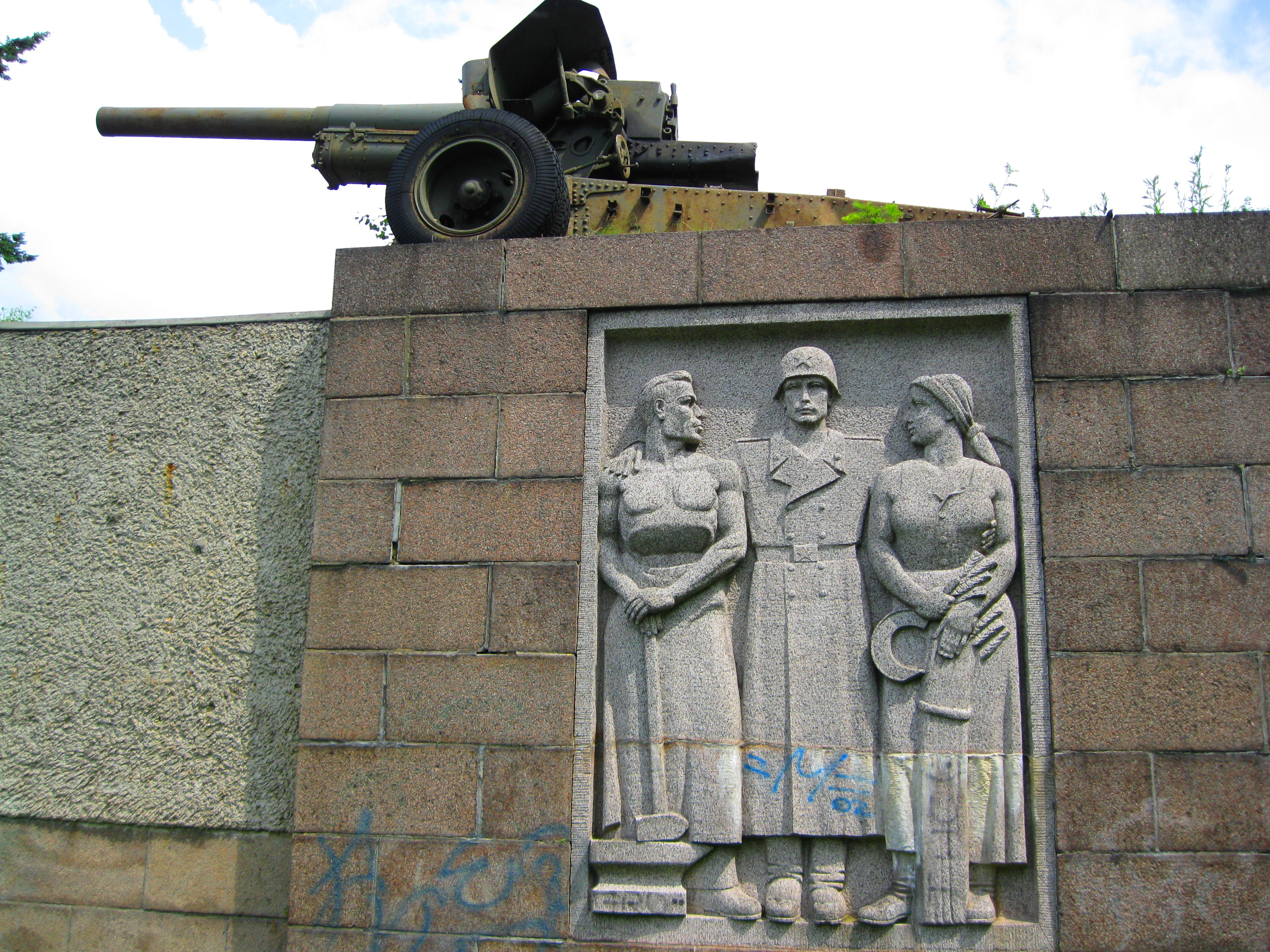 Cmentarz żołnierzy radzieckich w Cybince - haubica 152mm wz.1938 M-10.